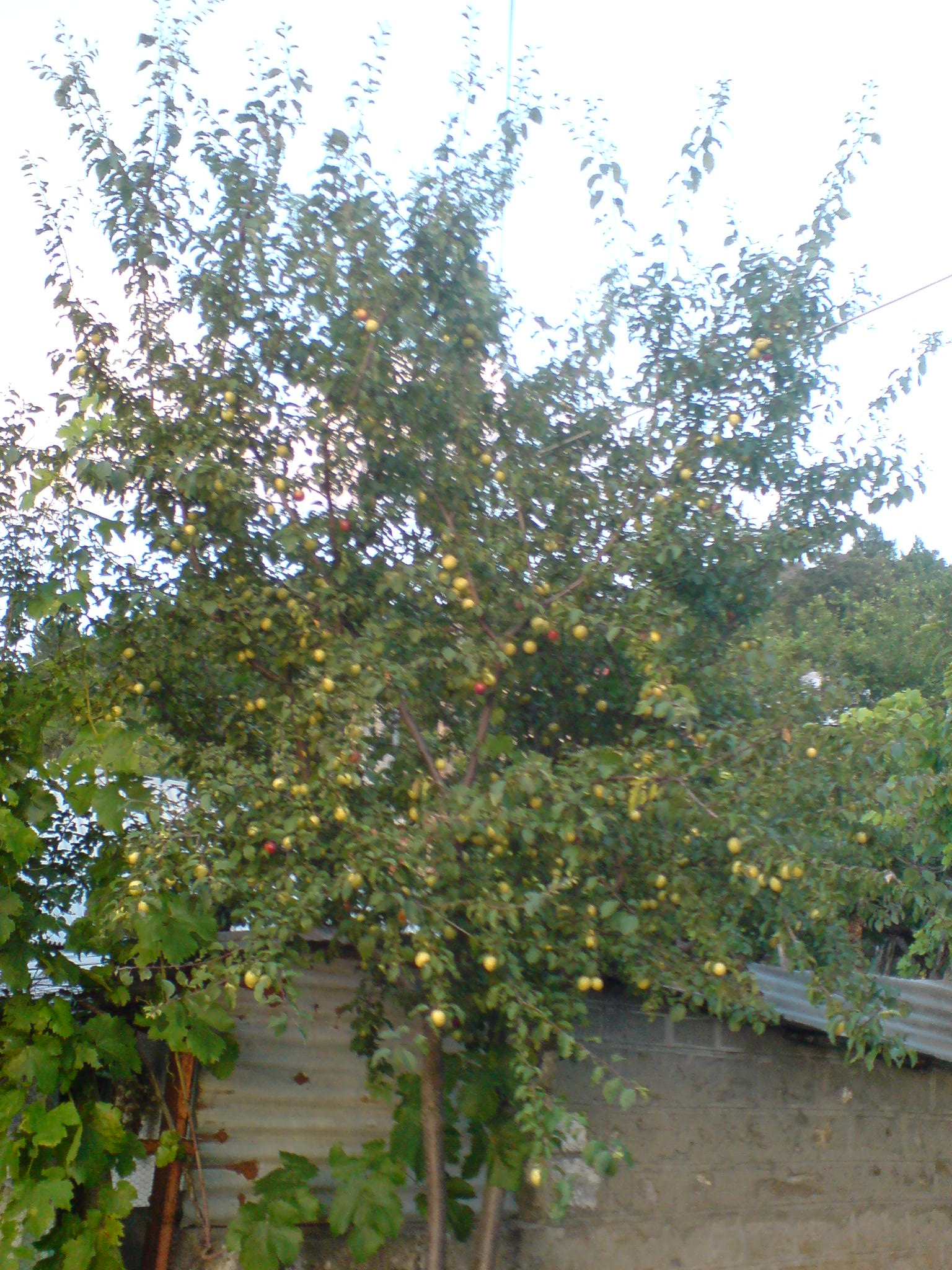 Κορομηλιά φορτωμένη με καρπούς